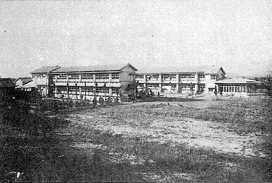 中文（台灣）: 松山療養所病棟由東側的視角